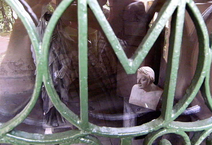 Mausoleum Eilhard Mitscherlich, Alter St.-Matthäus-Kirchhof, Blick durch die Gittertür (nach der Restaurierung) mit der Büste von C.D. Rauch und Elisabeth Ney. Foto L. Wekenborg